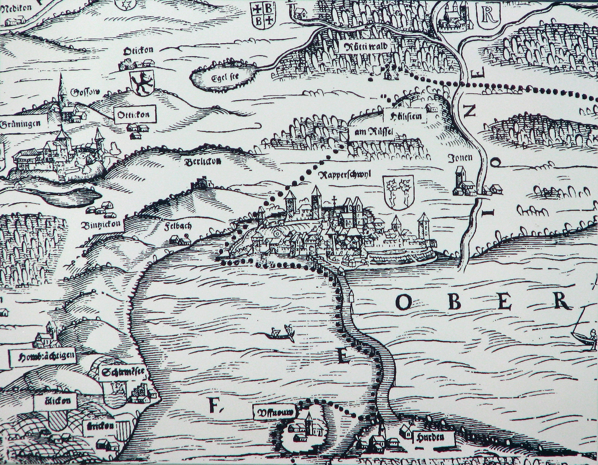 Das obere Zürichseegebiet um Rapperswil (SG) mit den ausgedehnten Wäldern (Rütner und Joner Wald) auf der Karte von Josias Murer aus dem Jahr 1566. Nebst heutigen Gemeinden – u.a. links Grüningen, oben Bubikon und Rüti (ZH), rechts Jonen (Jona SG), unten Insel Ufenau und Hurden (SZ) – sind die Rütner Weiler Hülistein, Rüssel und Matten eingezeichnet. Der Hüllistein ("Hohler Stein") an der Strasse zwischen Rapperswil und Rüti war in jener Zeit weithin als ein Naturschauspiel bekannt, ein Wasserfall unter einer Naturbrücke. Deutlich eingezeichnet sind nebst anderen Details die Holzbrücke Rapperswil-Hurden und rechts die Jona (Ione), welche dem heutigen Ortsteil Jona seinen Namen gab.[Beschreibung teilweise übernommen aus der Schautafel 36 Museen]